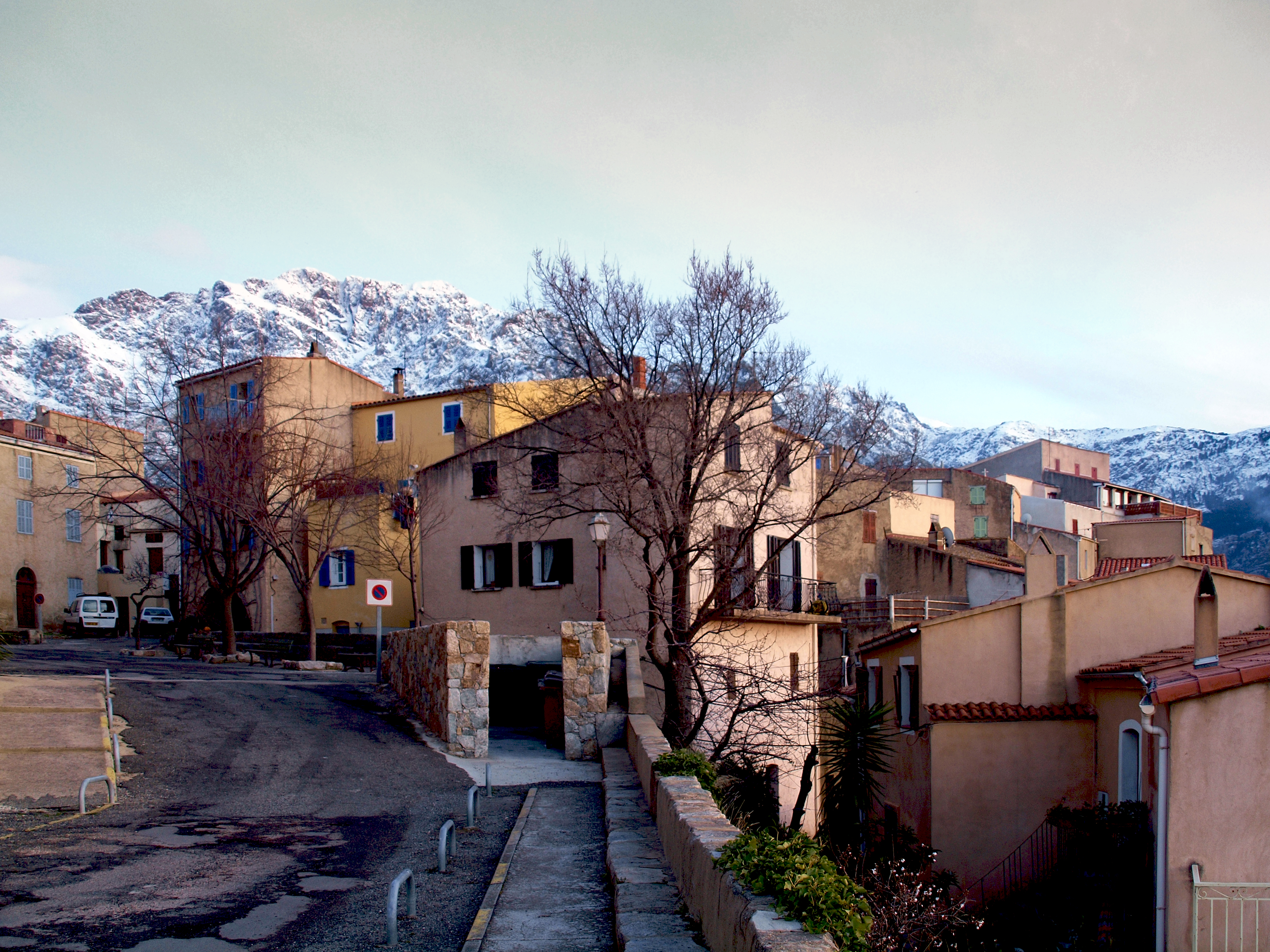 Montegrosso, Balagne (Corse) - Au soir du 16-02-2010, Cassano, l'un des trois composants de la commune avec Montemaggiore et Lunghignano. A l'arrière-plan, le Monte Grosso, montagne de près de 2000 m d'altitude.